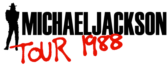 Logo del Bad World Tour 1988 di Michael Jackson